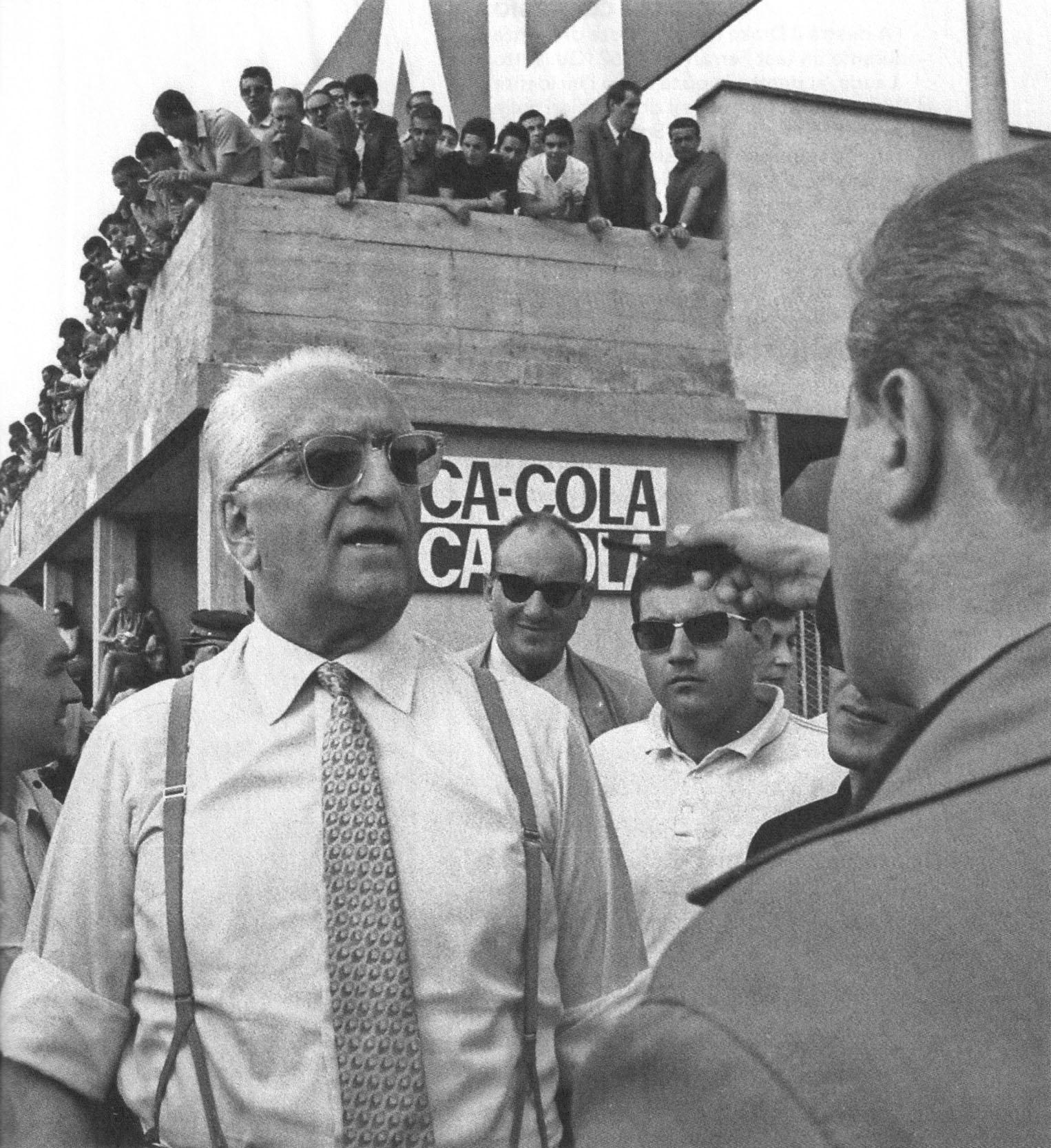 Monza, Autodromo Nazionale, settembre 1967. Enzo Ferrari, fondatore della Scuderia Ferrari, a colloquio con i giornalisti nei box del circuito, nel weekend del XXXVIII Gran Premio d'Italia.